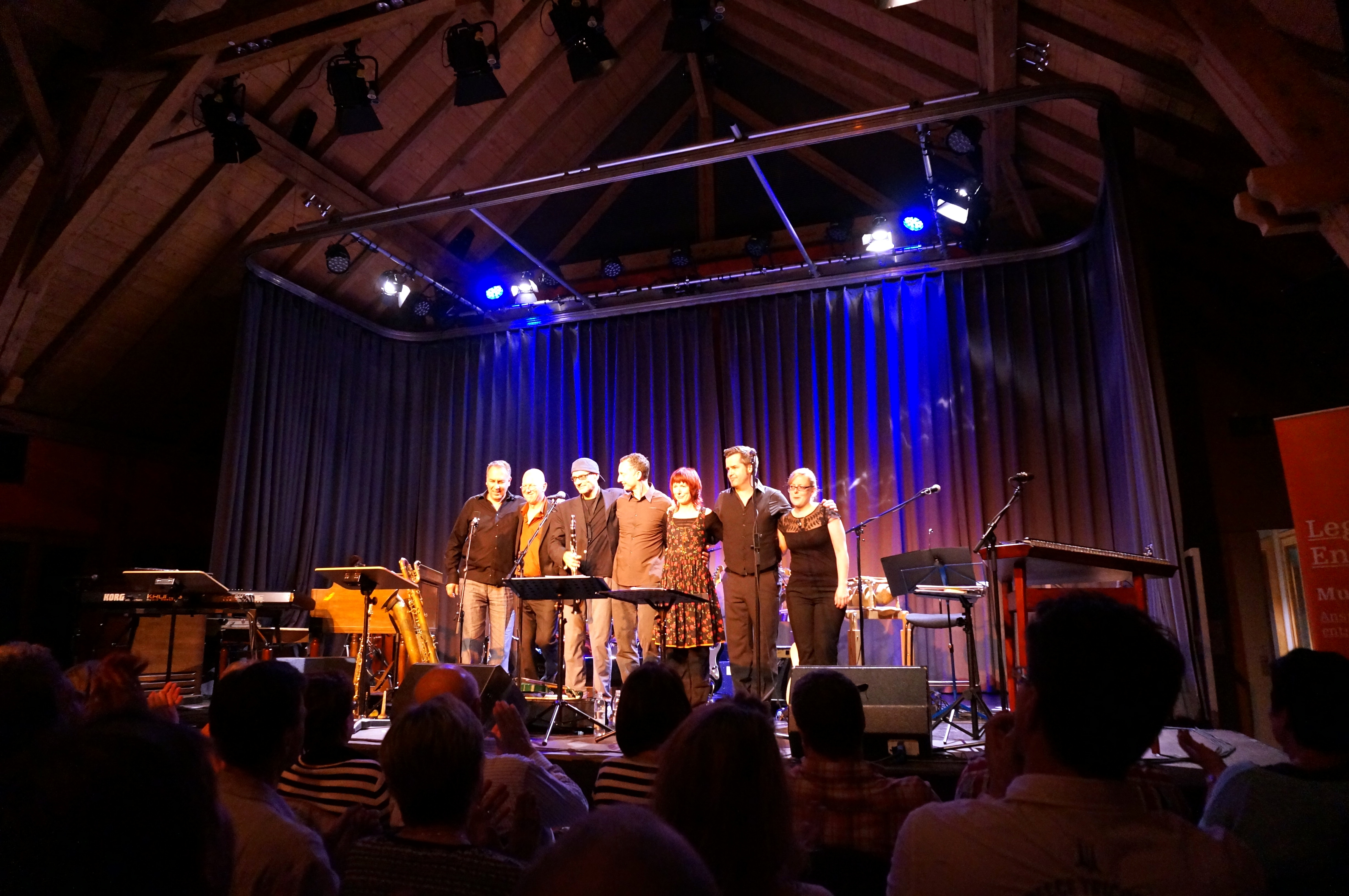 Veranstaltungsforum Fürstenfeld, Kleiner Saal in Fürstenfeldbruck im Juni 2013 beim Auftritt von Monika Drasch & Band mit ihrem Programm "Auf der böhmischen Grenz"